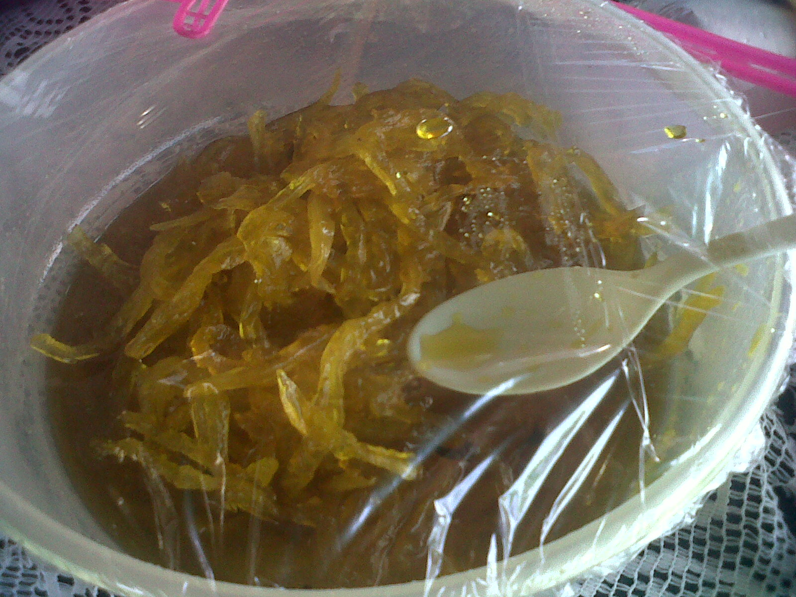 Caballito, cabellito, dulce de papaya, Colombia